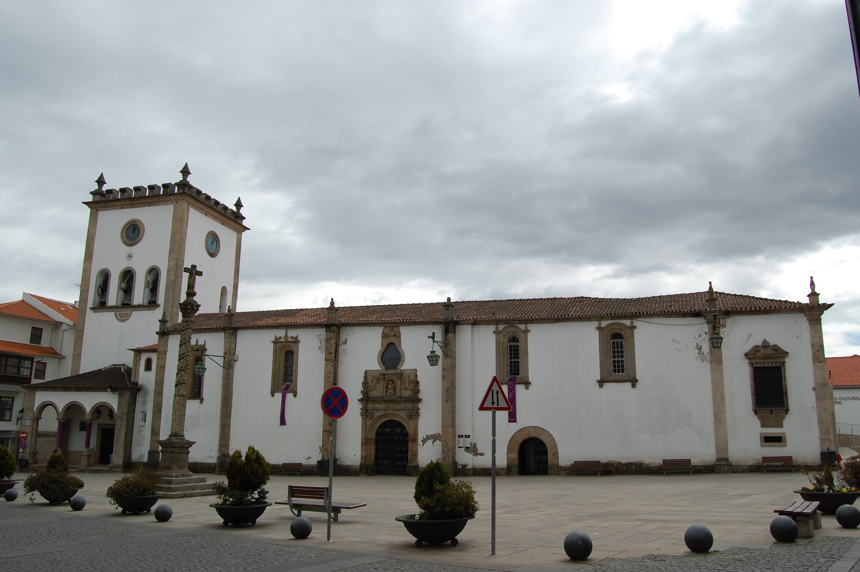 A Sé Velha de Bragança, no nordeste de Portugal.